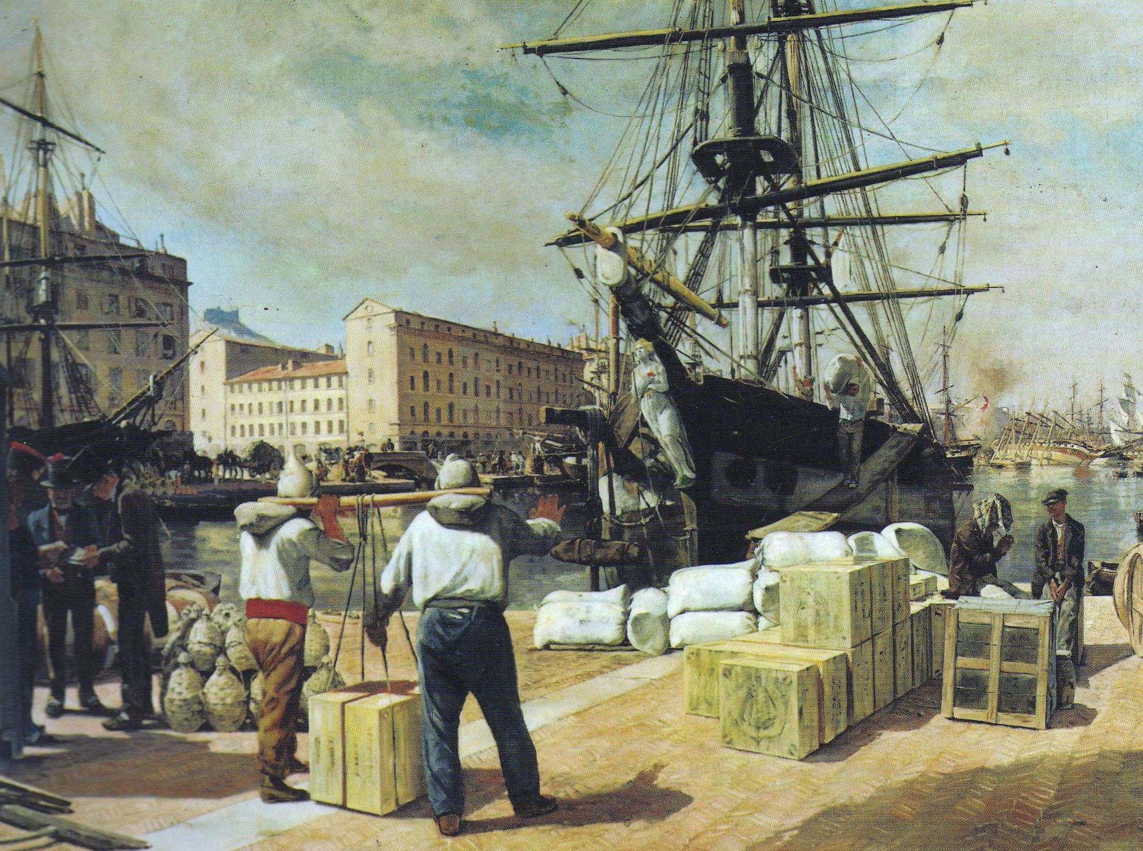 Déchargement d'un brick à Marseille. (Vue partielle)title QS:P1476,fr:"Déchargement d'un brick à Marseille. (Vue partielle)" label QS:Lfr,"Déchargement d'un brick à Marseille. (Vue partielle)"